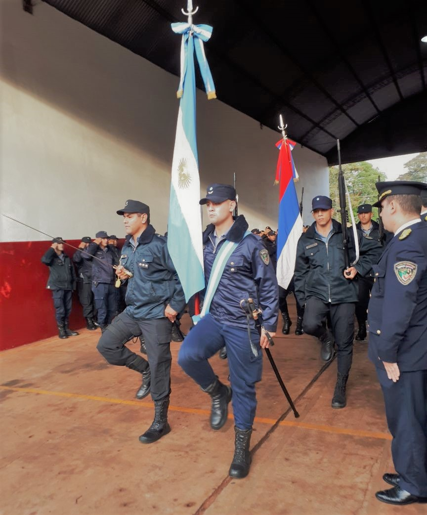 Bandera de ceremonias de l Unidad Regional IX (Jardín América) - Policía de Misiones. Fuenteː Periodista Horacio Cambeiro.